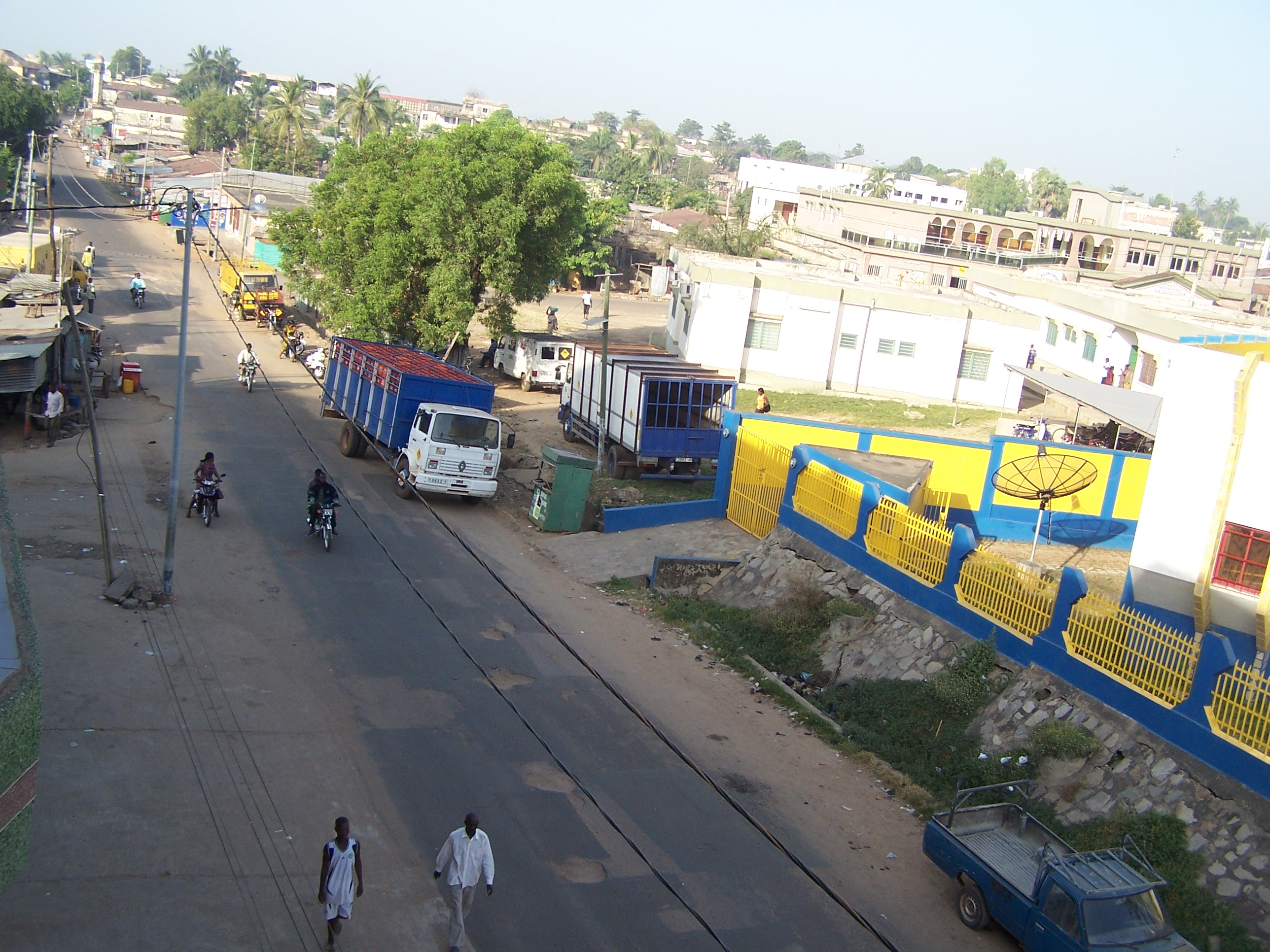 Kara, Togo